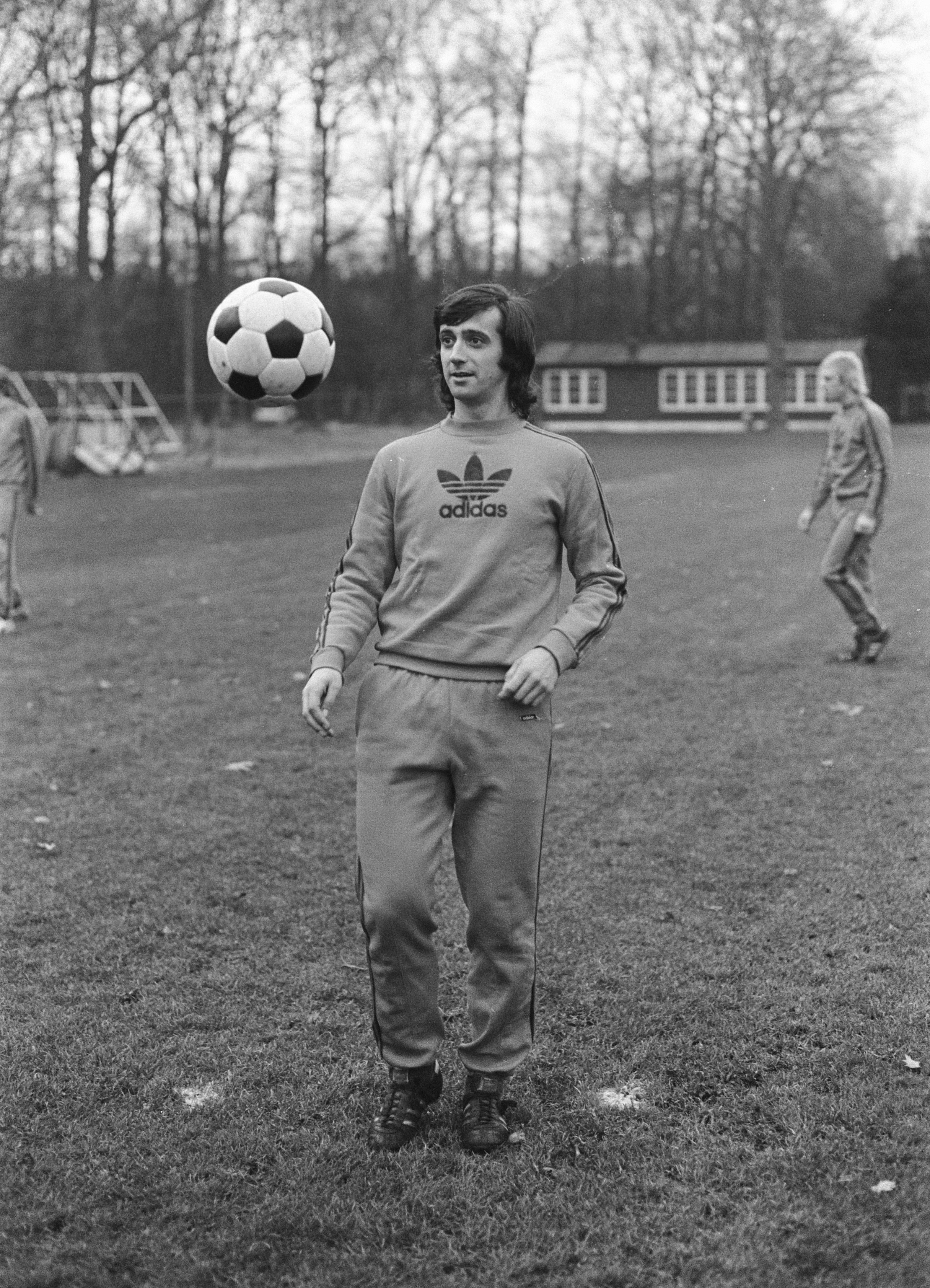 Collectie / Archief : Fotocollectie Anefo Reportage / Serie : [ onbekend ] Beschrijving : Nederlands elftalselectie traint in Zeist; nr. 13, 14 Willy van der Kuylen tijdens training, nr. 15, 16 Cruijff tijdens training Datum : 18 november 1974 Locatie : Utrecht, Zeist Trefwoorden : sport, trainingen, voetbal Persoonsnaam : Cruijff, Johan, Kuylen, Willy van der Fotograaf : Peters, Hans / Anefo Auteursrechthebbende : Nationaal Archief Materiaalsoort : Negatief (zwart/wit) Nummer archiefinventaris : bekijk toegang 2.24.01.05 Bestanddeelnummer : 927-5907